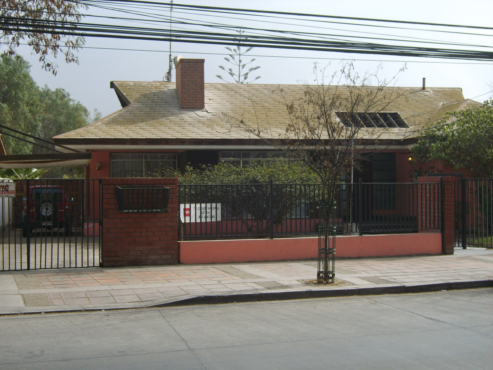 Oficinas y estudios de Televisión Nacional de Chile Red Atacama, ubicados en la ciudad de Copiapó.